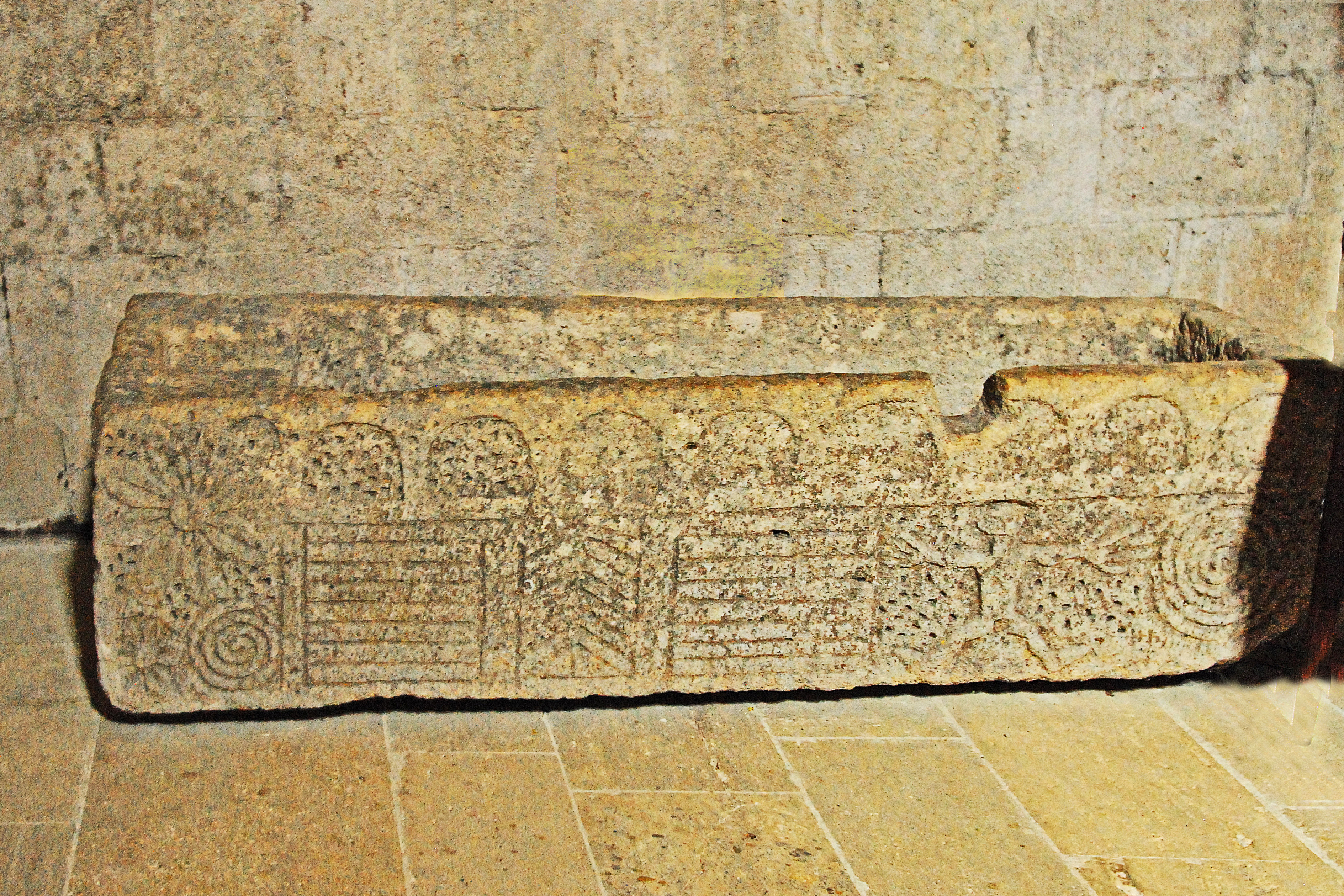 Prieuré de Ganagobie, Sarkophag im Schiff, 1. Joch